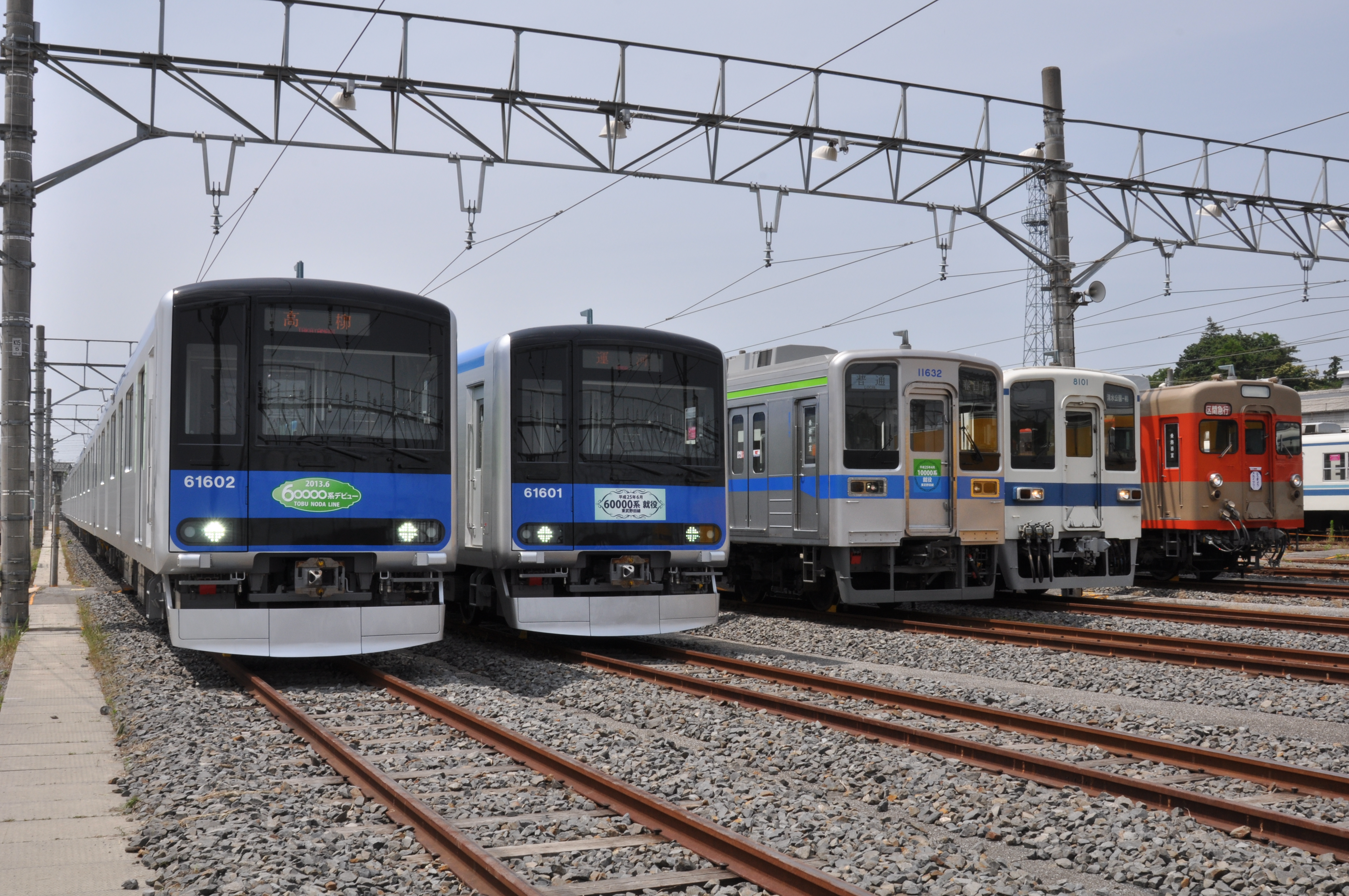 東武トラベル主催「60000系デビューイベント」の撮影会で並んだ 東武鉄道60000系電車61602編成ならびに61601編成・10030系電車11632編成・8000系電車8101編成ならびに8111編成 （2013/6/9・南栗橋車両管区七光台支所にて撮影）